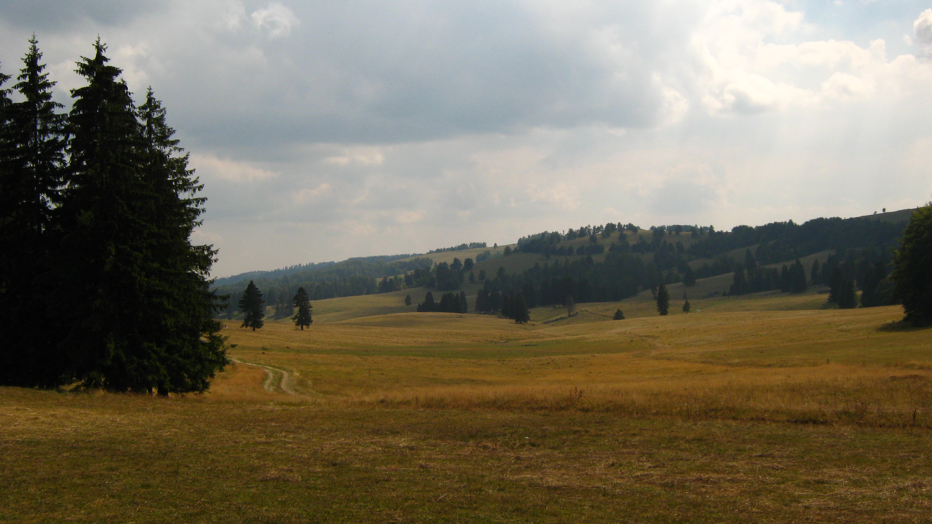 Пејзаж са Вучје планине